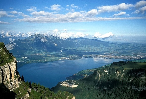 کوردی: ناوچەی ثون